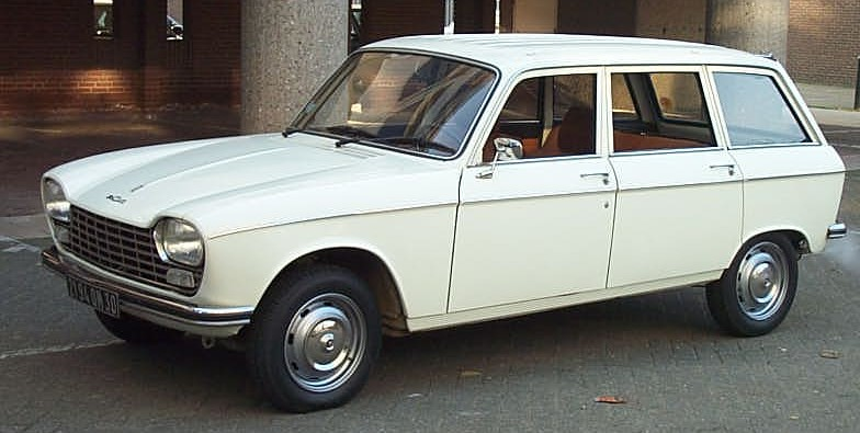 Peugeot 204 break modèle 1974